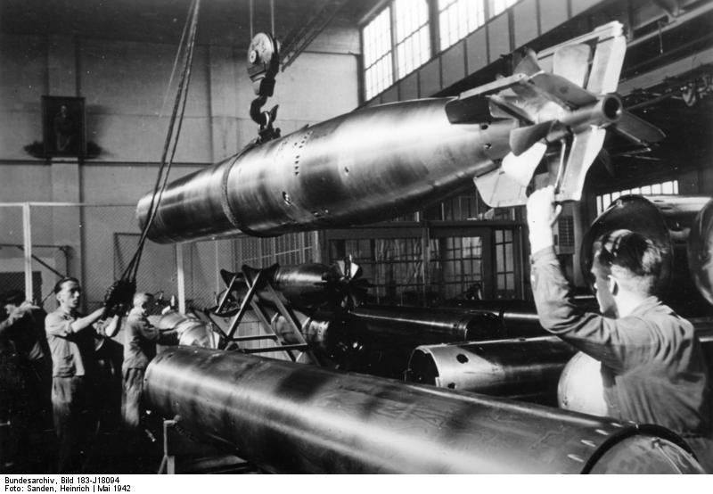 Deutschland, Torpedowerkstatt Scherl Bilderdienst Deutschland: Torpedowerkstätte.- Torpedo kommen zur Fertigmontage PK-Aufnahme: Kriegsberichterstatter Sanden 4152-42 Mai 1942